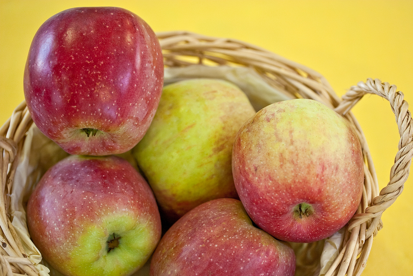 Der Florina ist eine Apfelsorte